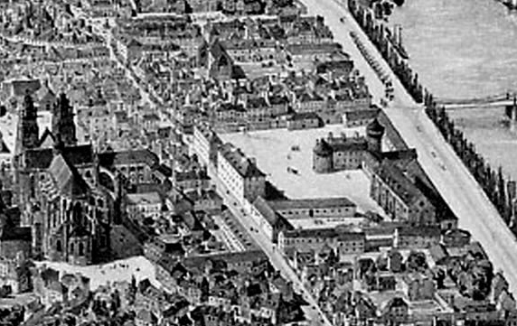 Détail d'une gravure "excursion aérienne", par Arnout, donnant une vue de Tours à partir d'une montgolfière, réalisée vers 1855